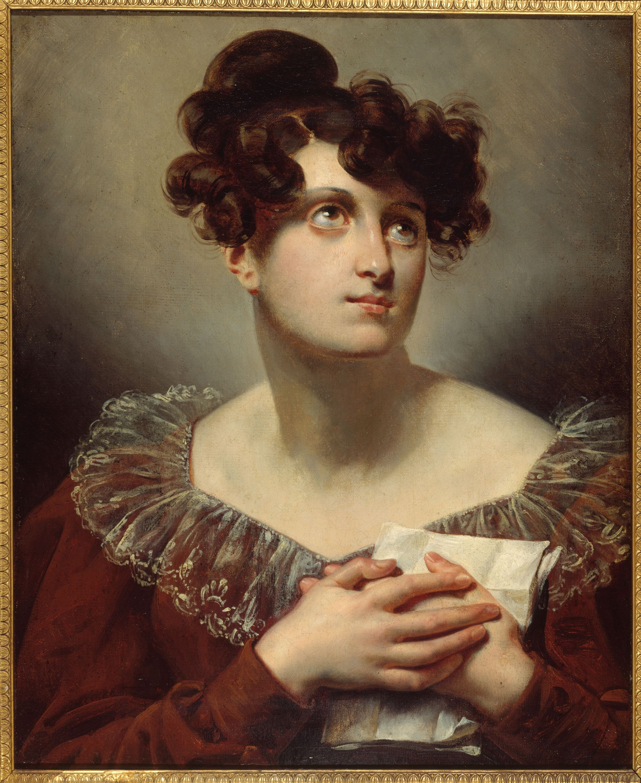 Mademoiselle Mars (1779-1847)